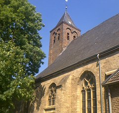 Katholische Kirche Sankt Cosmas und Damian in Bienen